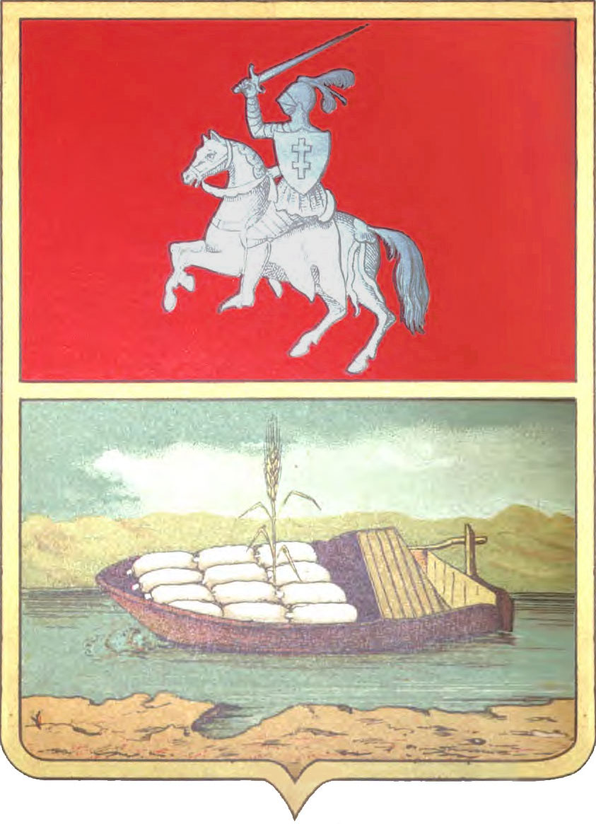 Беларуская (тарашкевіца): Герб Вялейскага павету (Vialejka) з «Пагоняй» («Pahonia»)